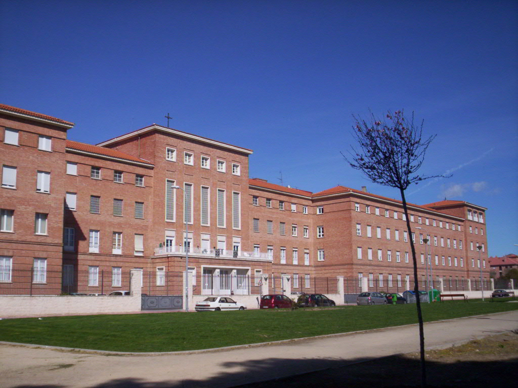 Colegio y residencia de la Compañía de Jesús en el Ensanche de Alcalá de Henares. Fachada principal (sur).